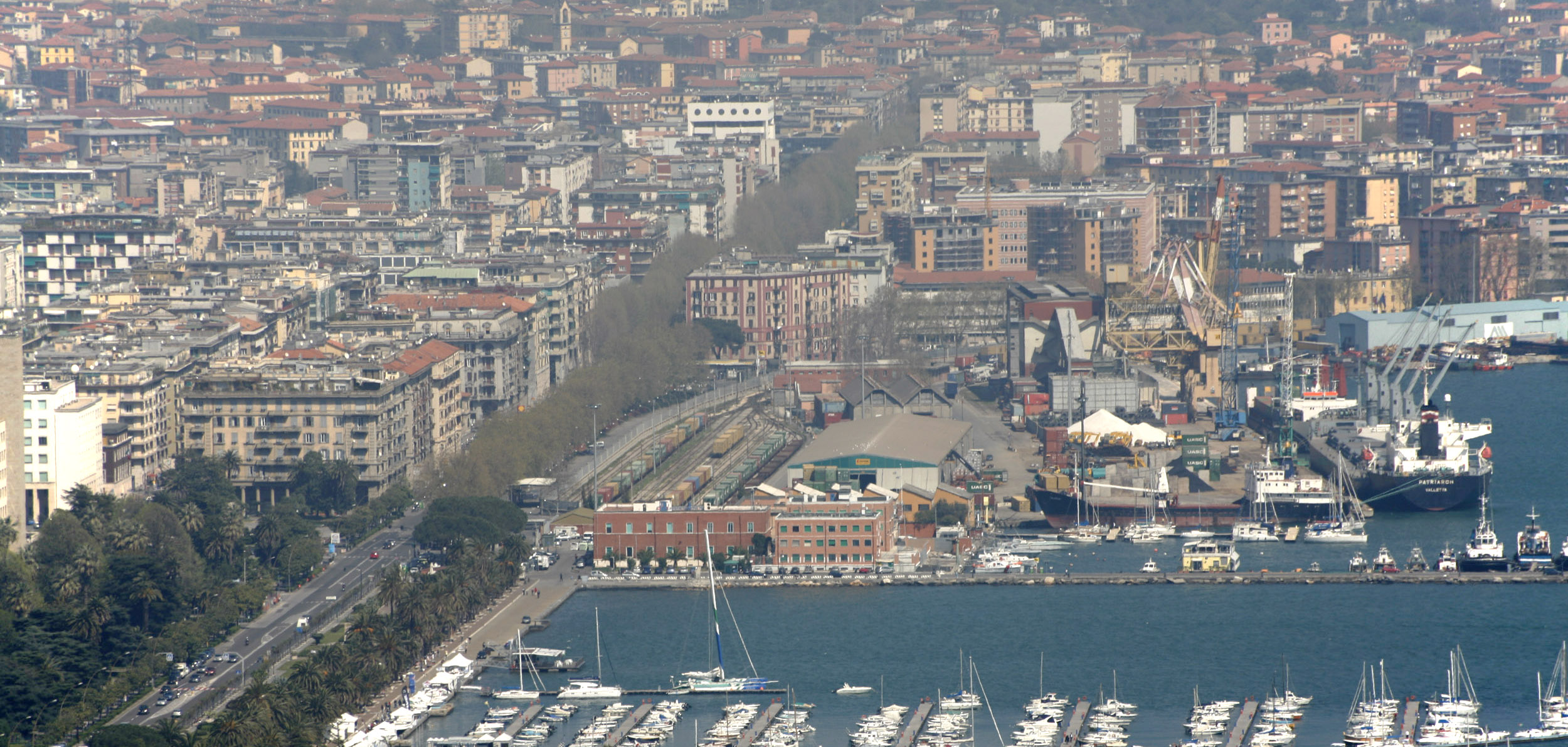 Panorama della città di La Spezia